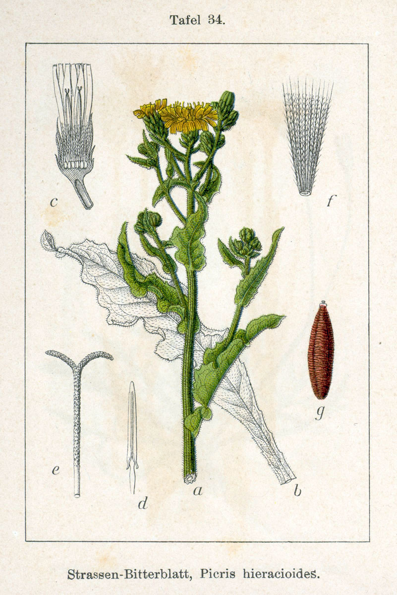 Picris hieracioides L. s. l. Original Description "Strassen-Bitterblatt", Picris hieracioides